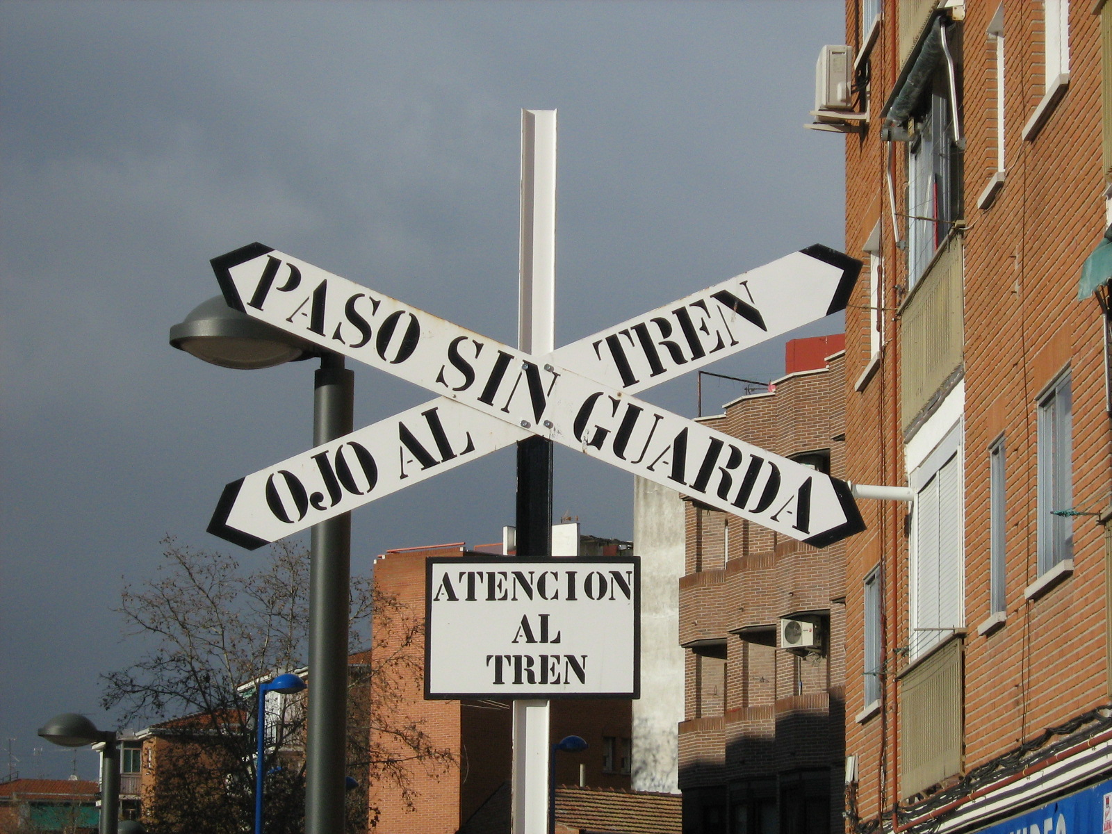 Señalización del paso a nivel sin barreras del antiguo ferrocarril militar a Cuatro Vientos. Situado en el barrio de San Nicasio, Leganés (Comunidad de Madrid).